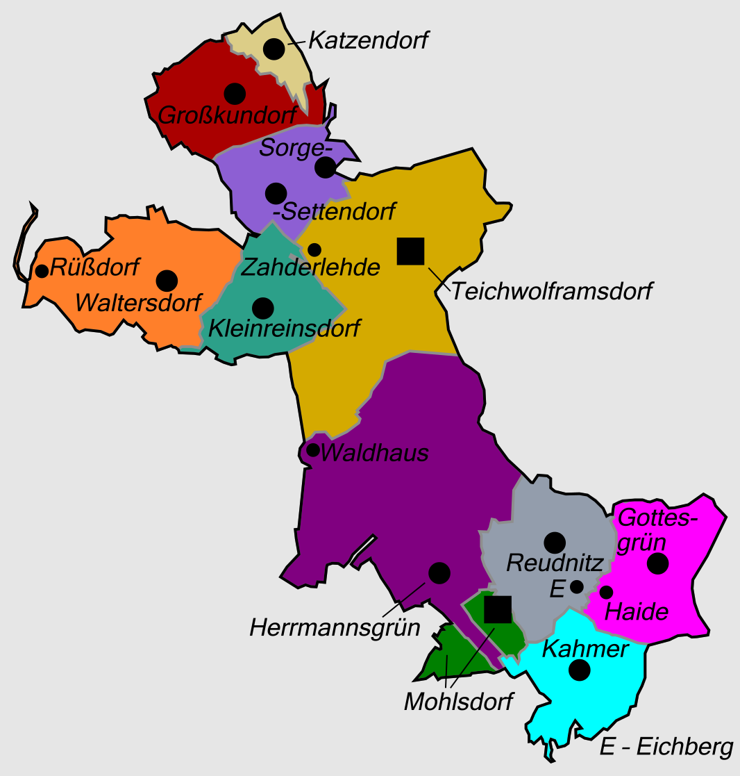 Gliederung der Gemeinde Mohlsdorf-Teichwolframsdorf ab 1. Mai 1920